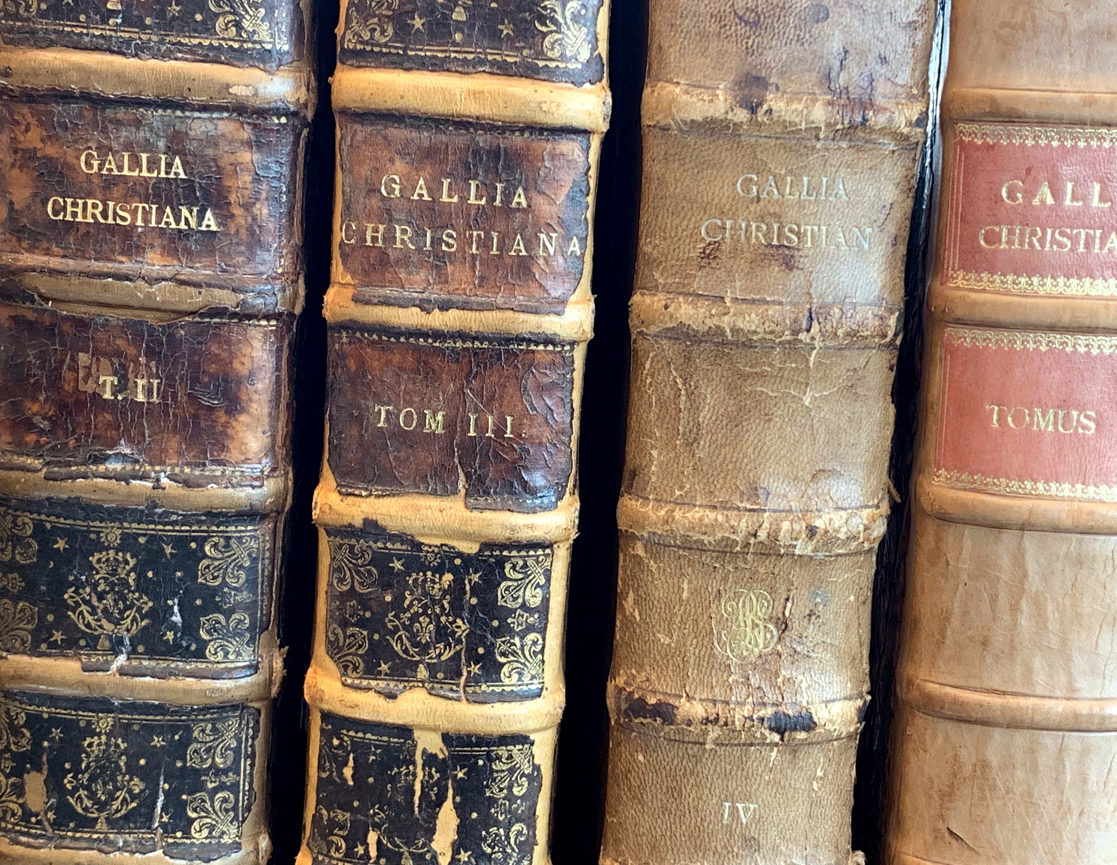 Gallia Christiana au fonds ancien de la bibliothèque de Lyon.